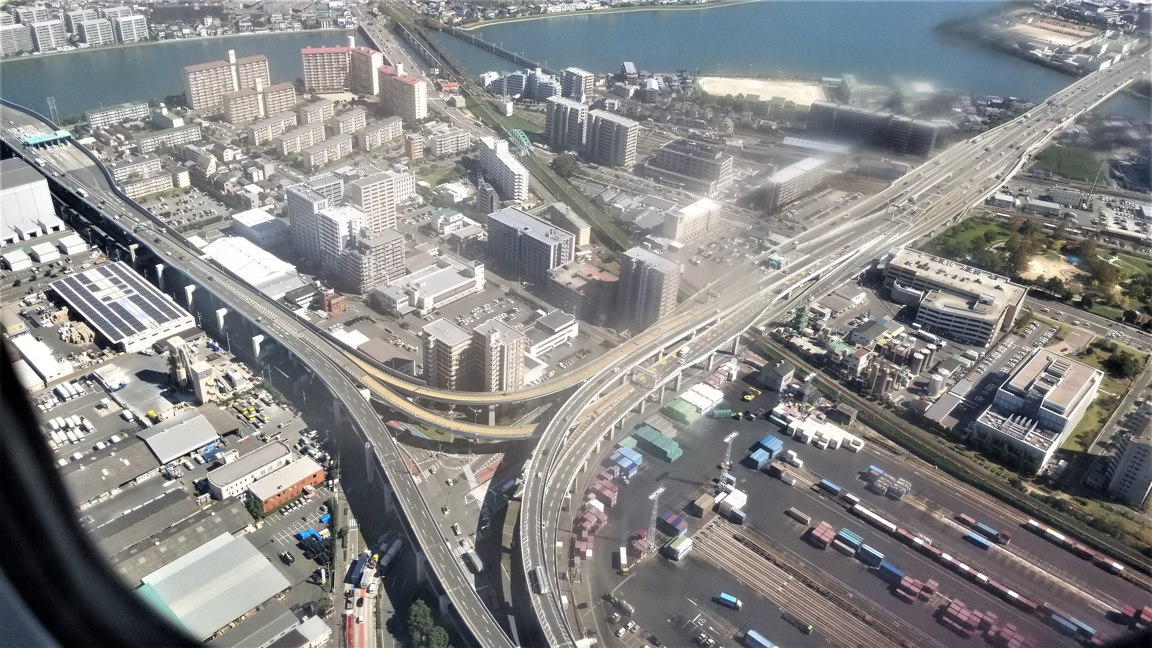 航空機内から撮影した福岡都市高速道路貝塚ジャンクション